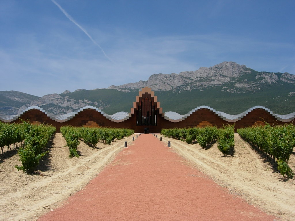 La Rioja LSI 2007